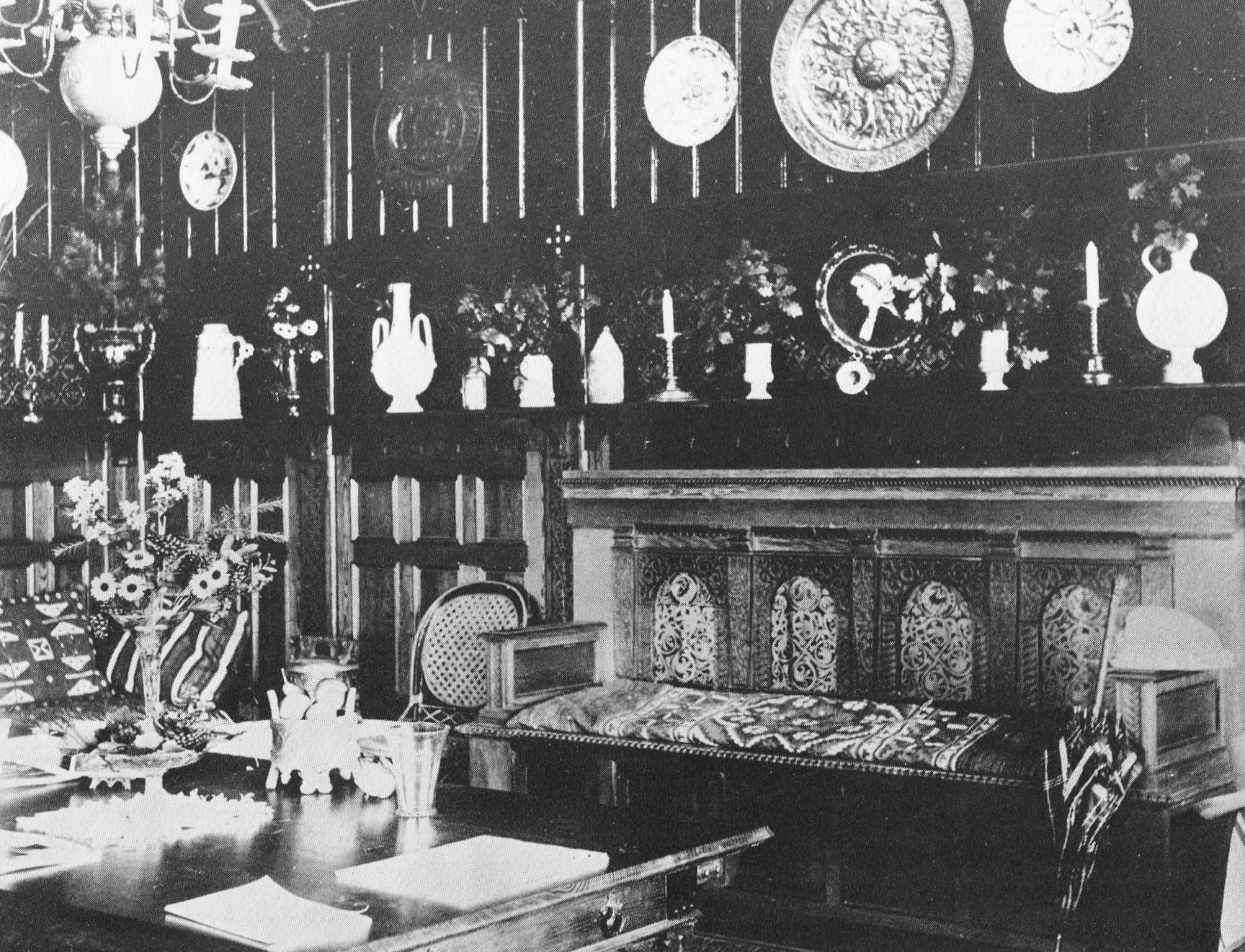 Villa Sagatun, Mälarhöjden, interiör